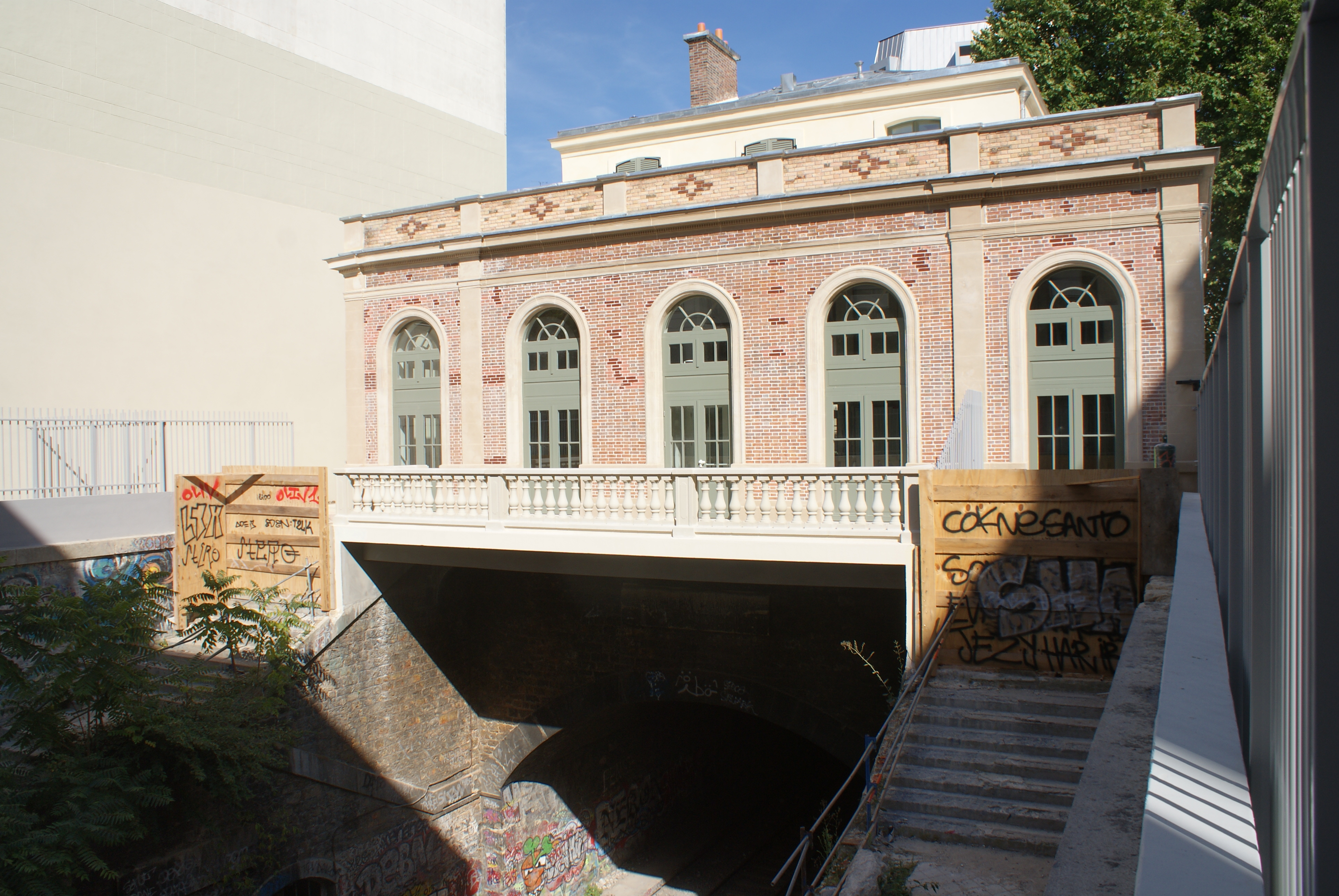 Face arrière de la gare de Montrouge-Ceinture en août 2017, après sa rénovation.